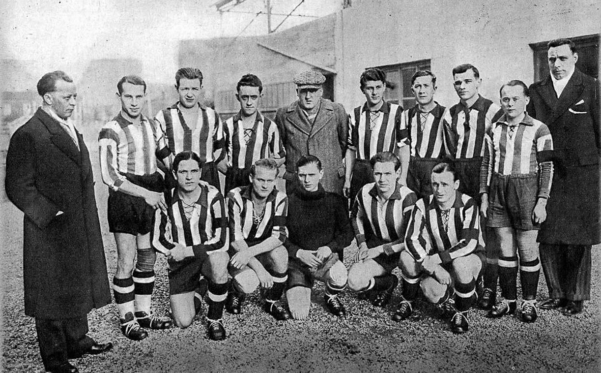 D'Equipe vun der Jeunesse am Februar 1935. Original caption: "DIE ESCHER JEUNESSE IN PARIS -- Am 16. Februar spielte Jeunesse in Paris gegen eine starke Mannschaft des Racing Club und schloss ehrenvoll mit 2:2 ab Unsere Bilder zeigen die Jeunesse-Mannschaft und einige interessante Spielphasen."